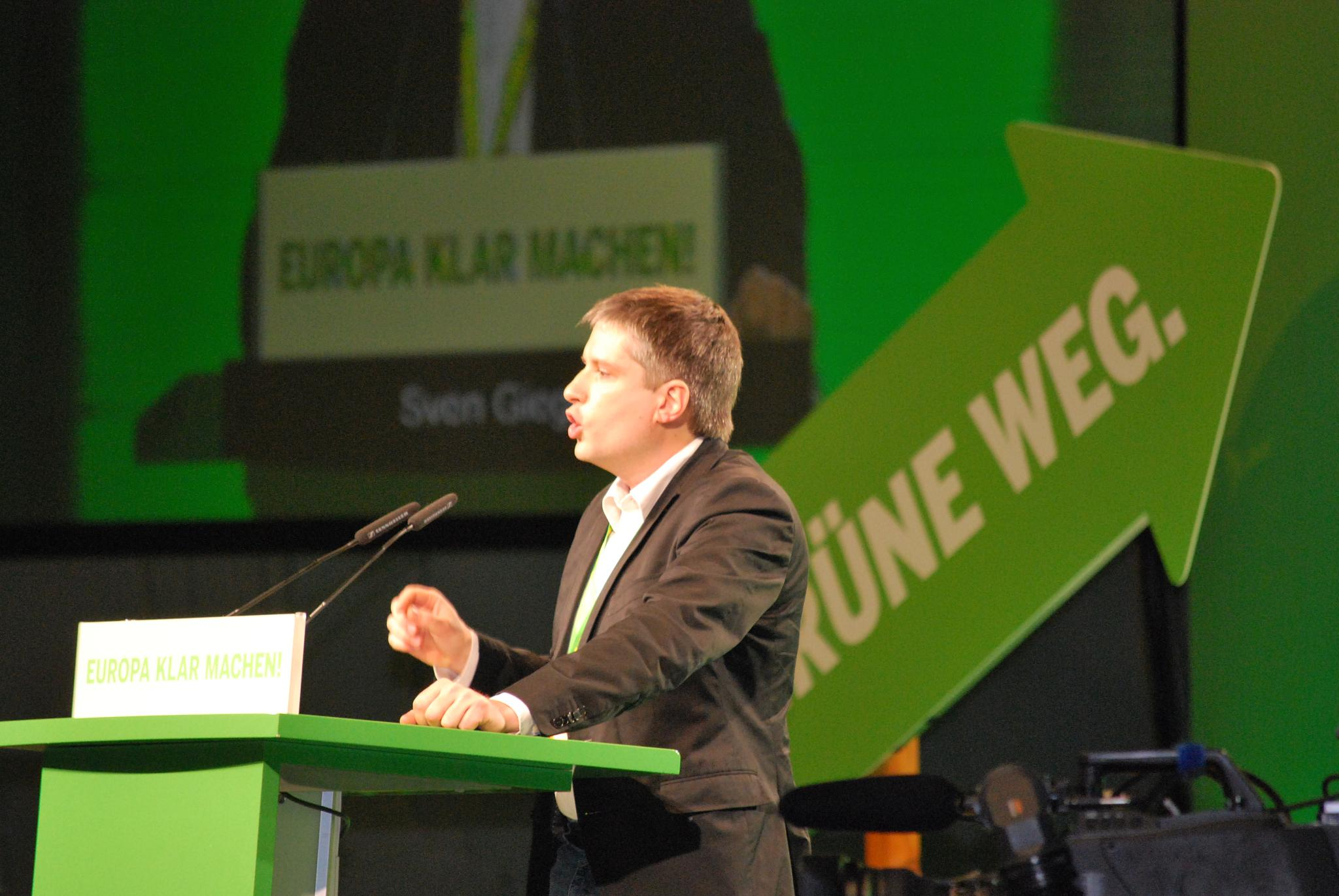 Sven Giegold BDK Dortmund 2009 Bundesparteitag (Bundesdelegiertenkonferenz, BDK) 2009 in den Westfalenhallen Dortmund vom 23.-25. Januar.